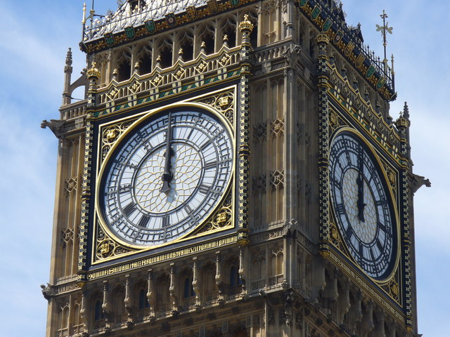 Big Ben in London um 12 Uhr mittags